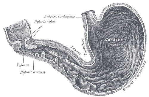 gaster